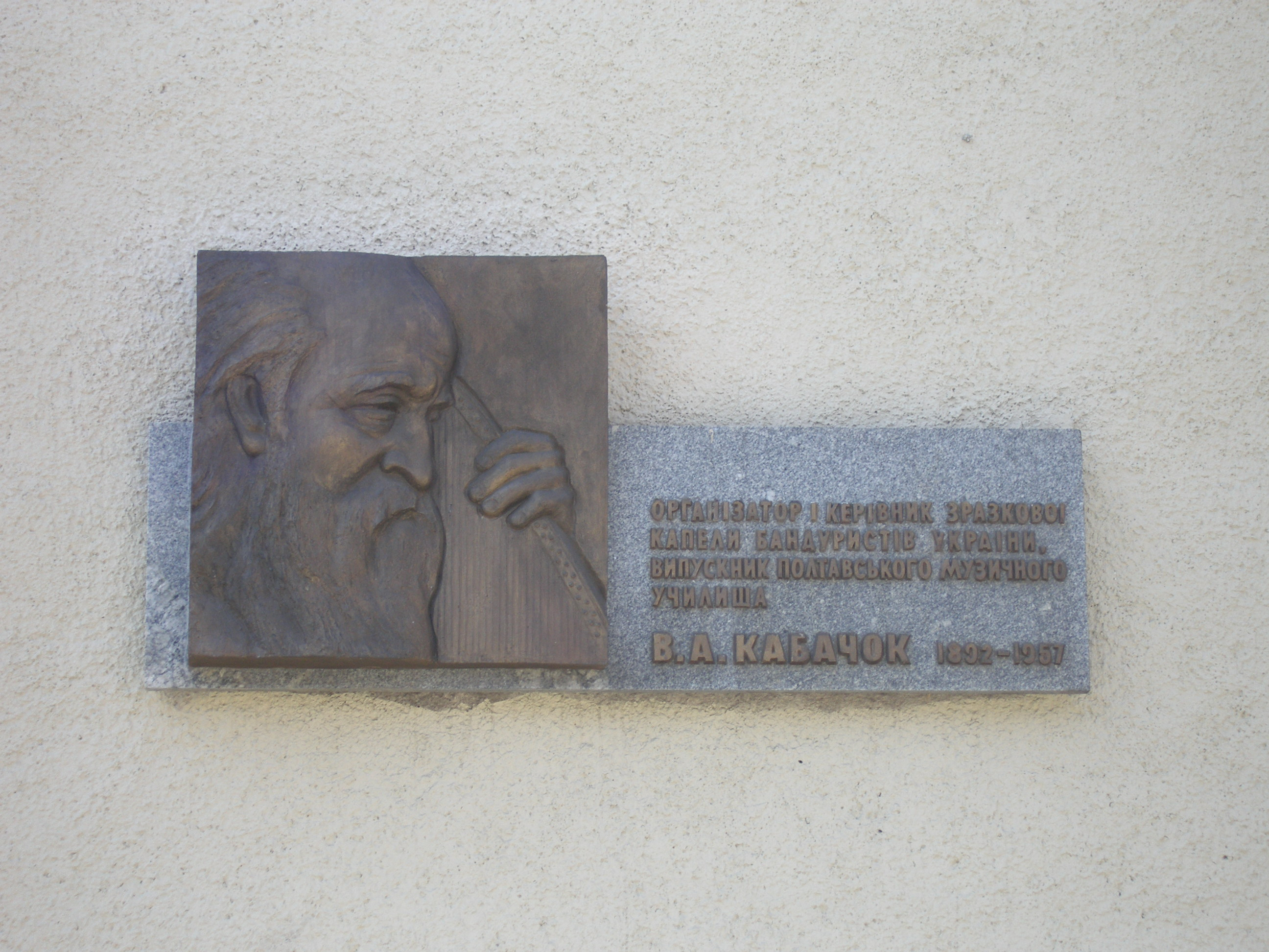 Організатор і керівник зразкової капели бандуристів України В.А.Кабачак 1892-1957